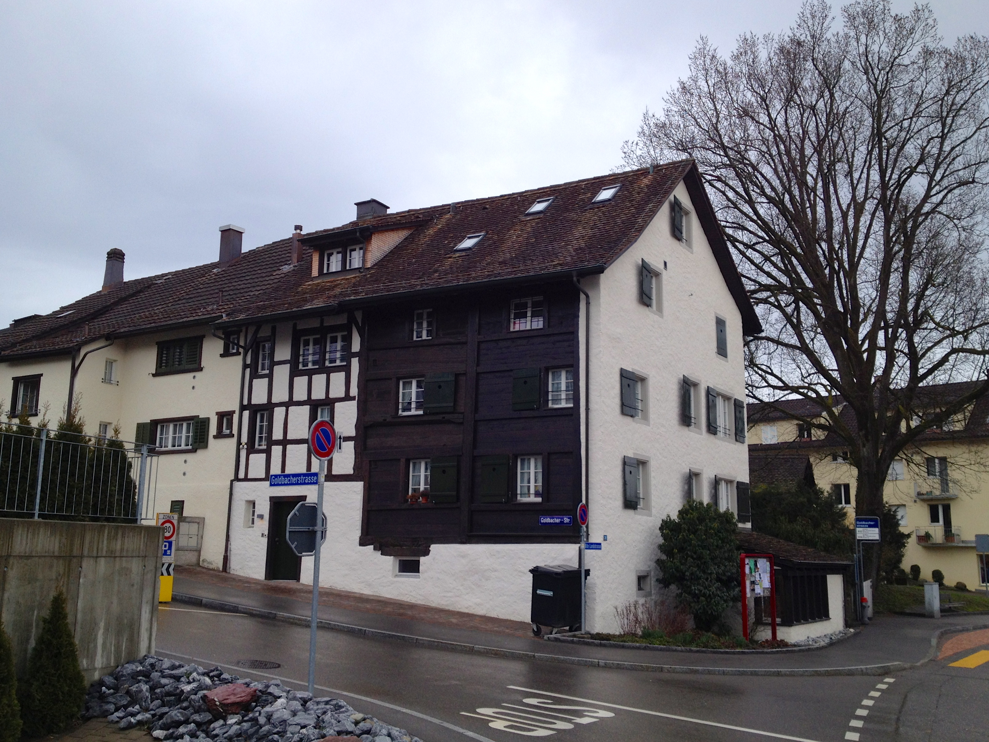 Goldbacherstrasse in Goldbach ZH